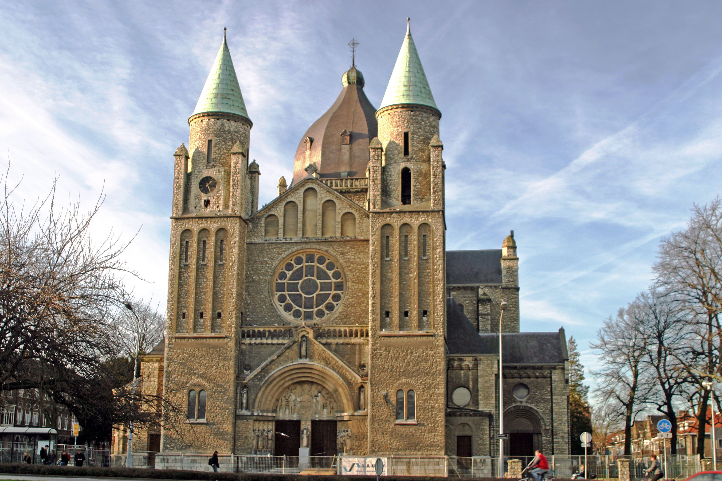 Kierch Maastricht.